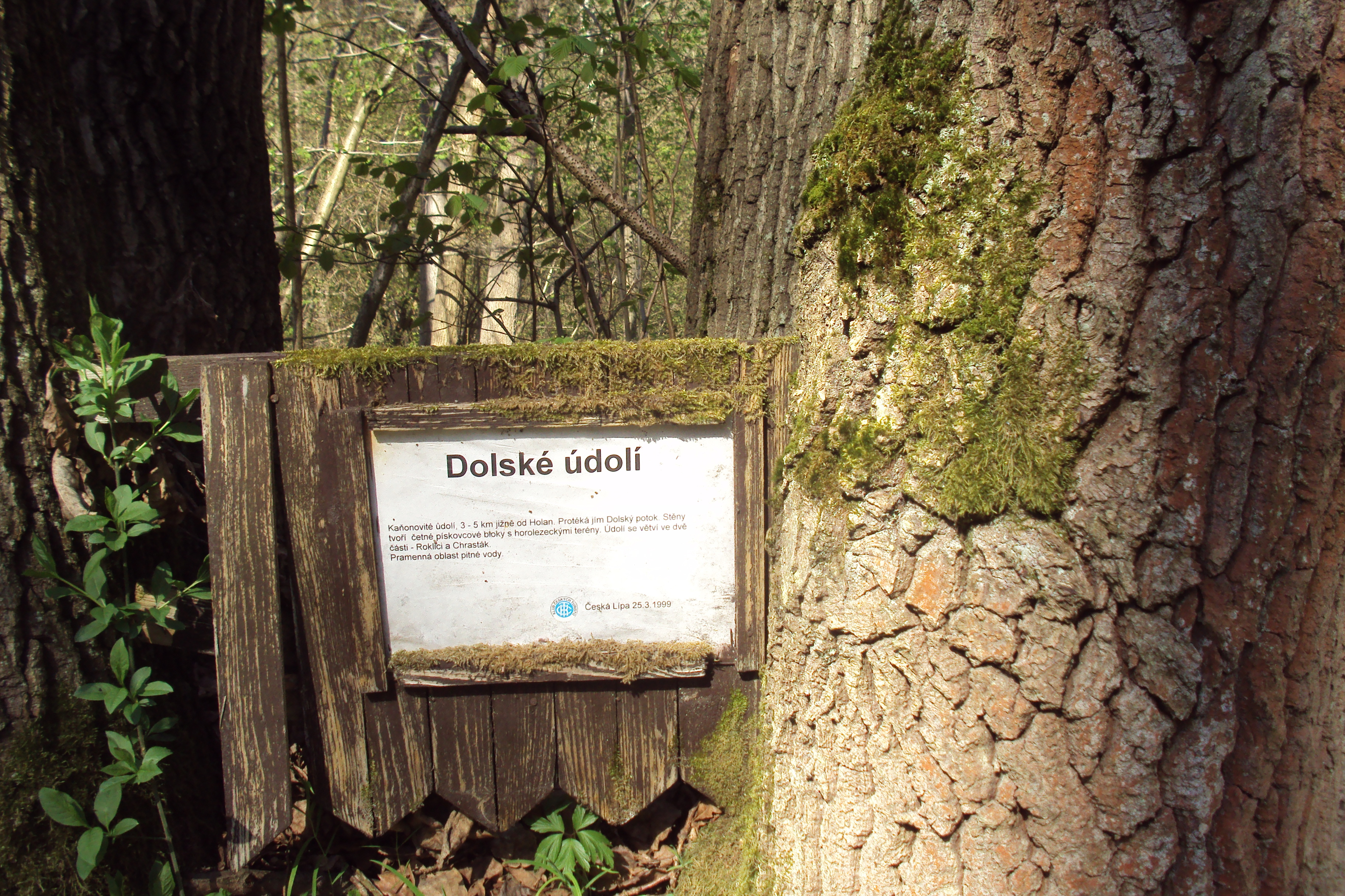 Začátek Dolského údolí jižně od městyse Holany, na zelené trase